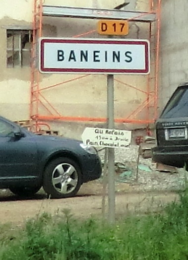 Panneau d'entrée Baneins.